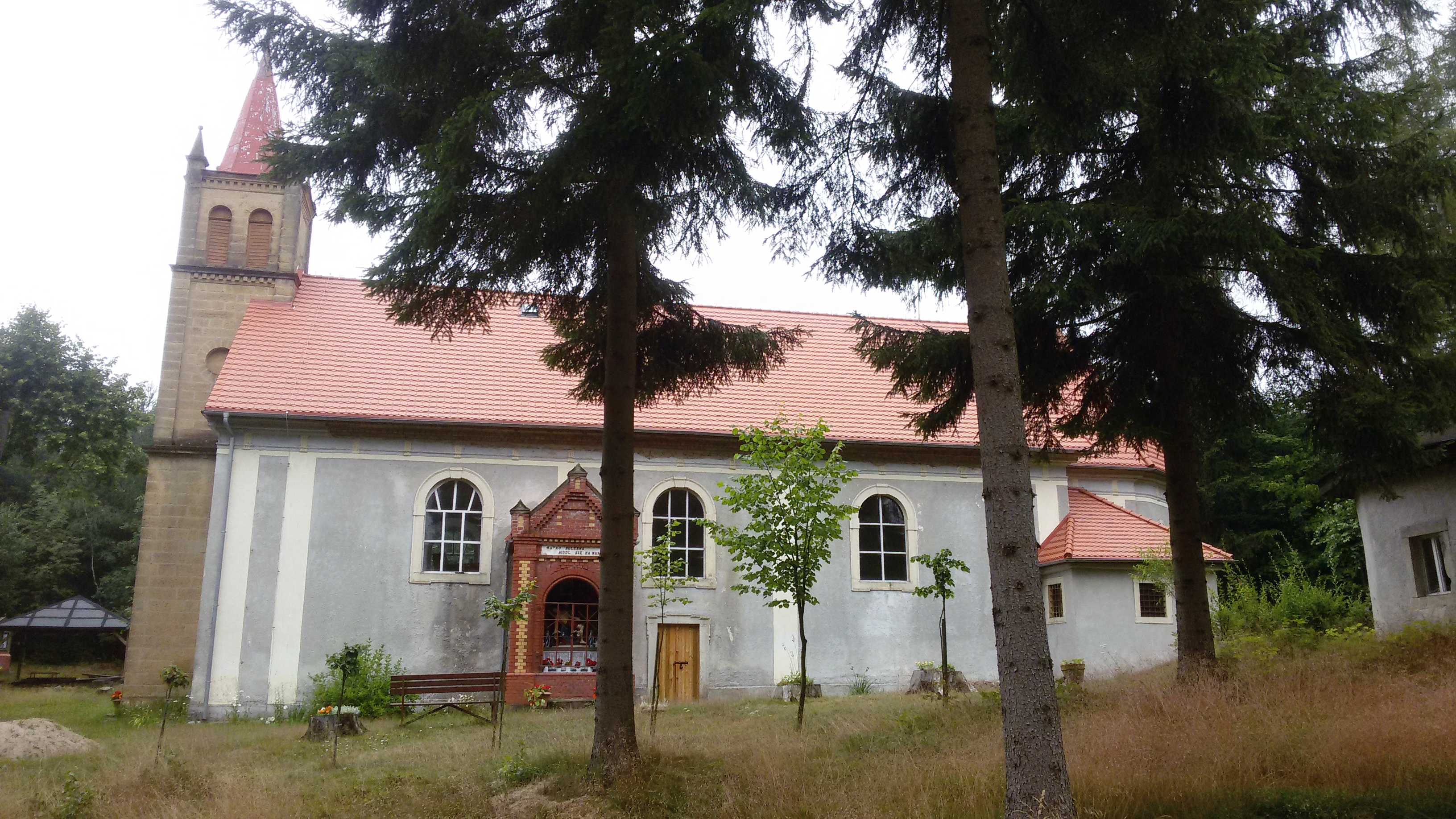 Kaplica św. Anny na Rogu w Zaworach k/Chełmska Śl.